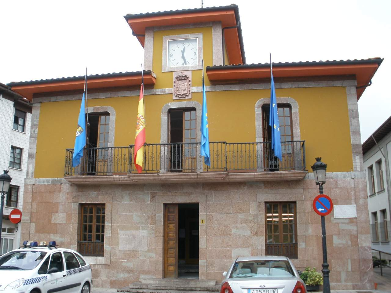 Ayuntamiento de Parres, en Arriondas (Asturias)